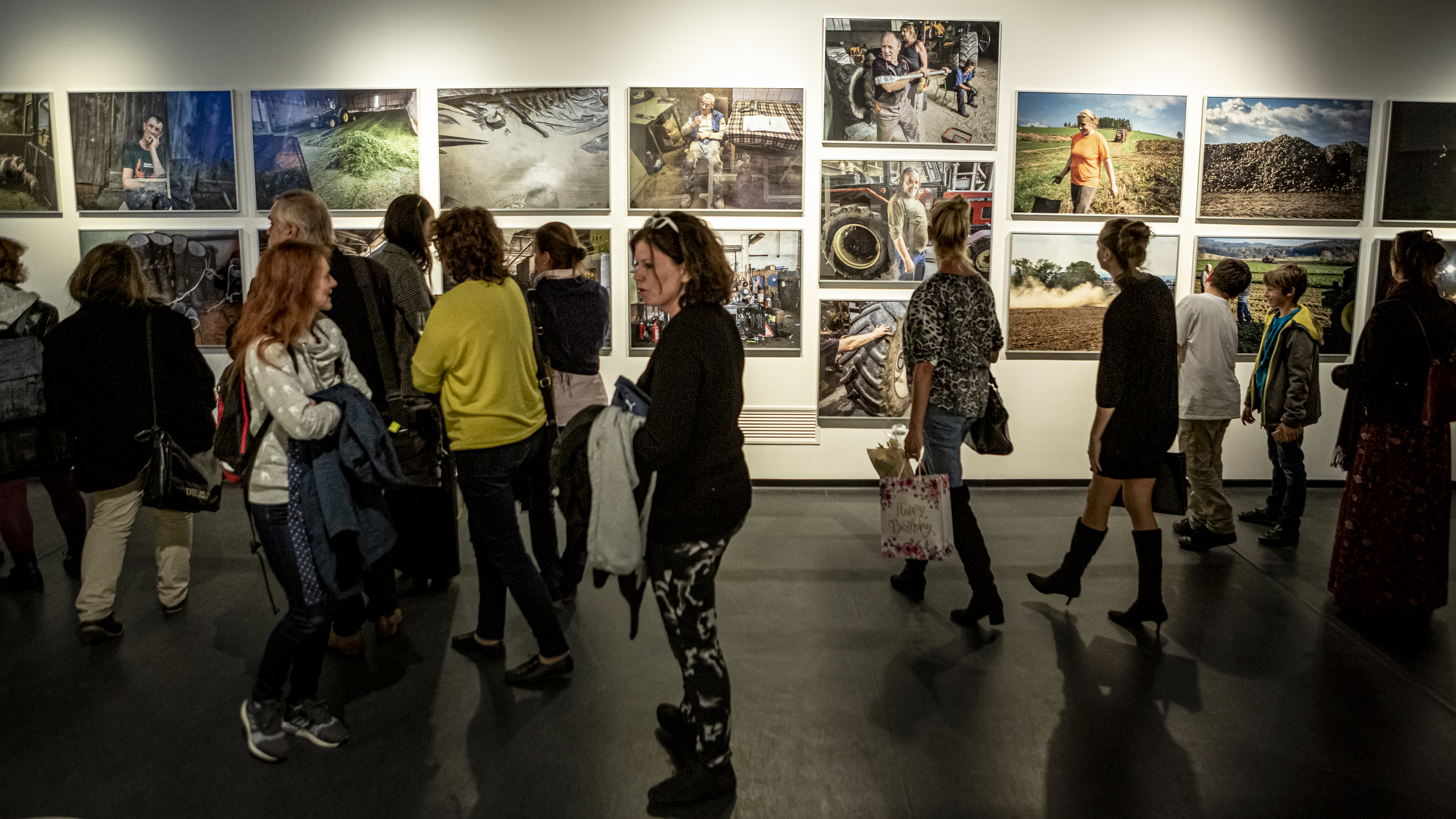 Dva fotografické cykly Jindřicha Štreita zachycující české zemědělství v 80. letech 20. století a v roce 2018, doplněné o exponáty věnované cyklům lidského života, základní cykly energie, hmoty a života. Národní zemědělské muzeum Praha. Termín konání: 20. 9. 2019 – 31. 7. 2020